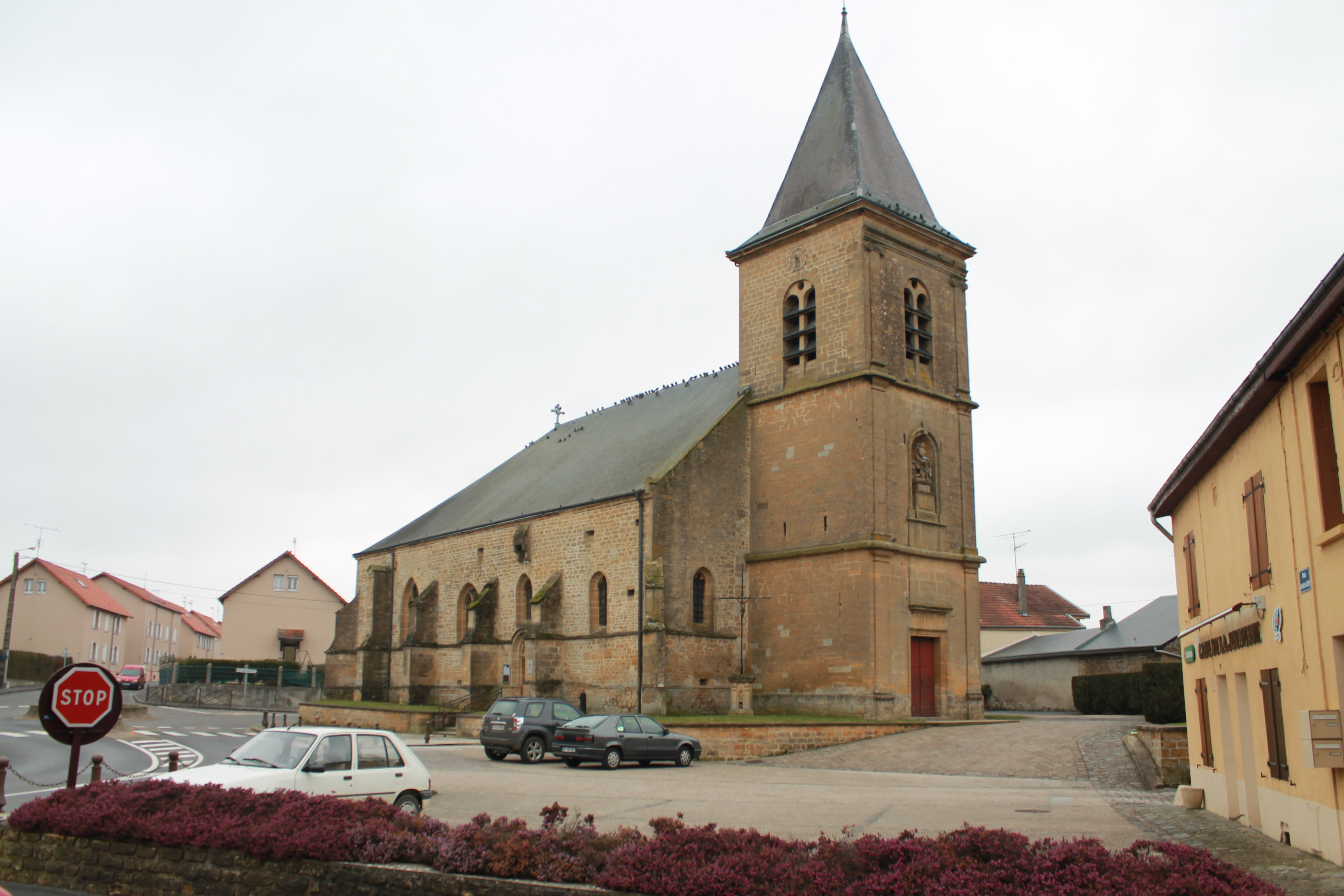 L'Eglise Notre Dame de l'Assomption, à Nouvion-sur-Meuse.